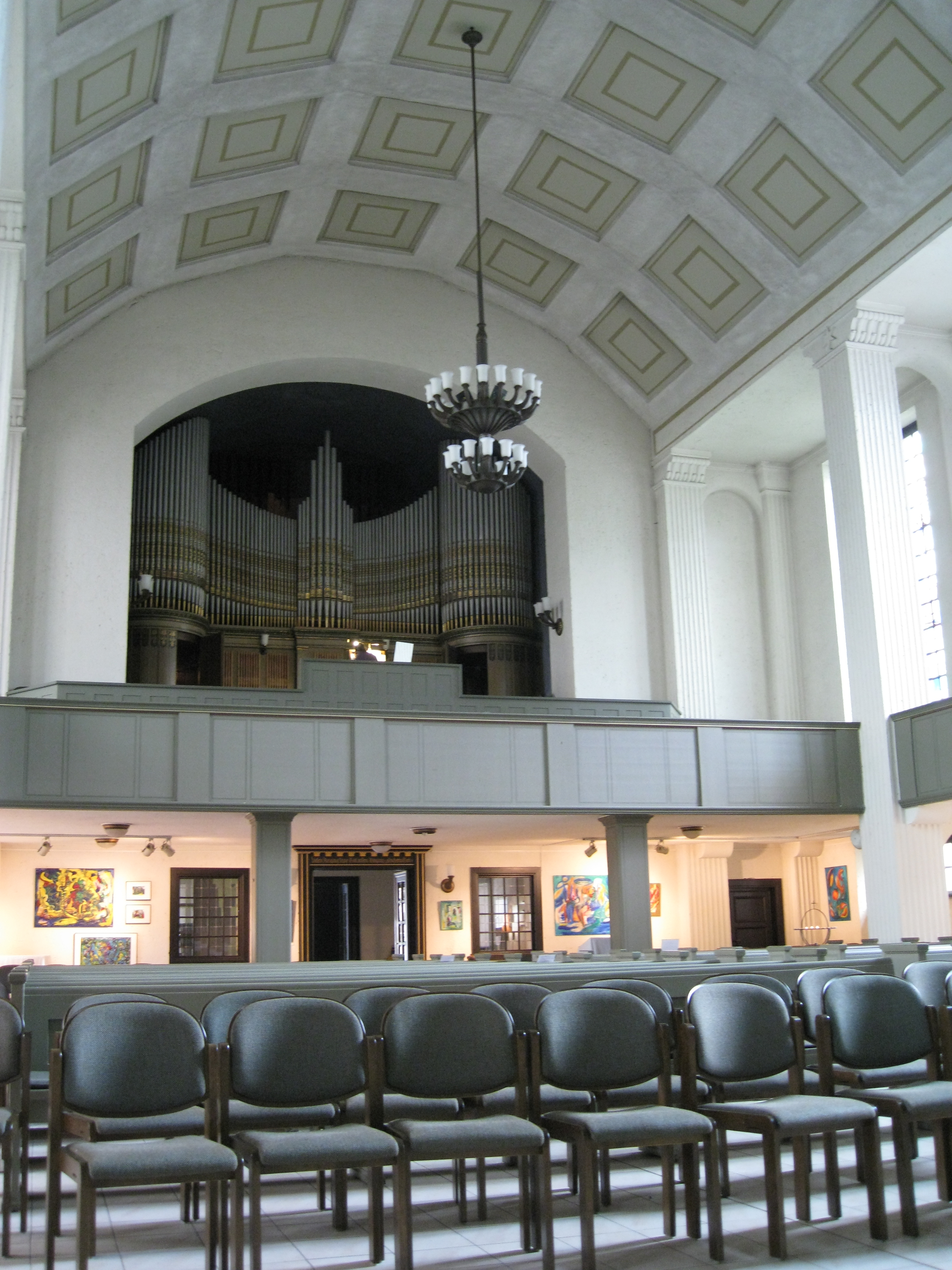 Blick auf Empore und Orgel der Glaubenskirche Berlin-Tempelhof